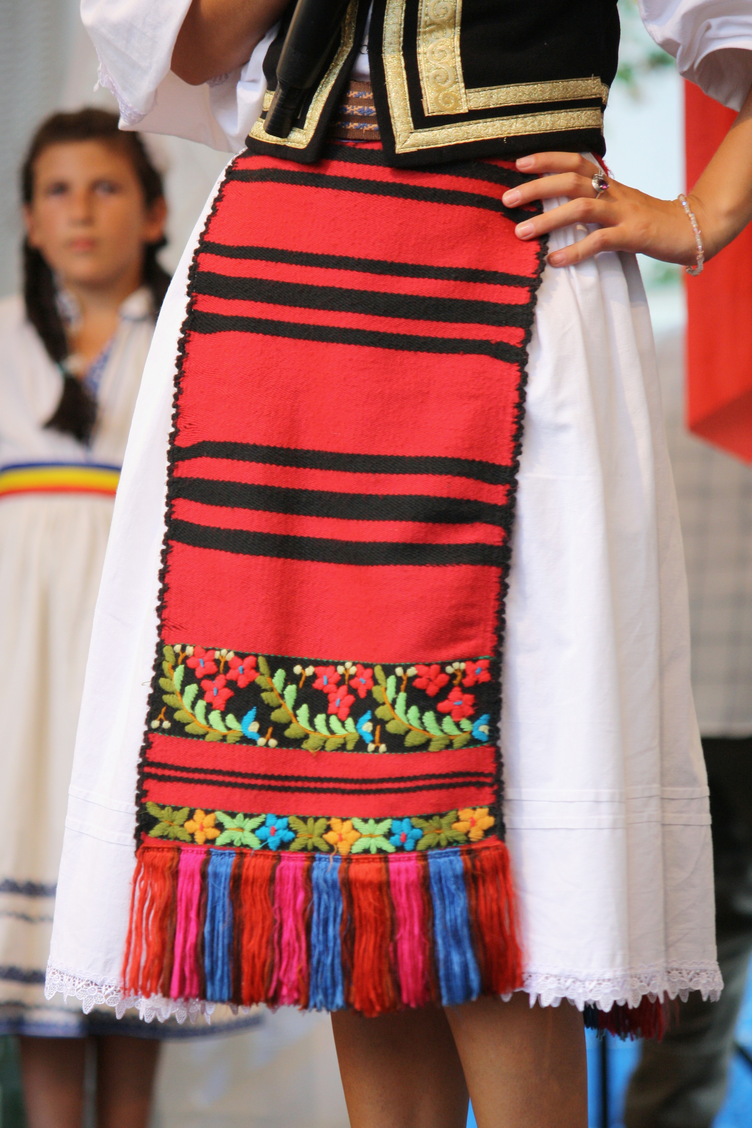 Pražský jarmark 2011 - z vystoupení rumunské folklórní skupiny Doina Somesana